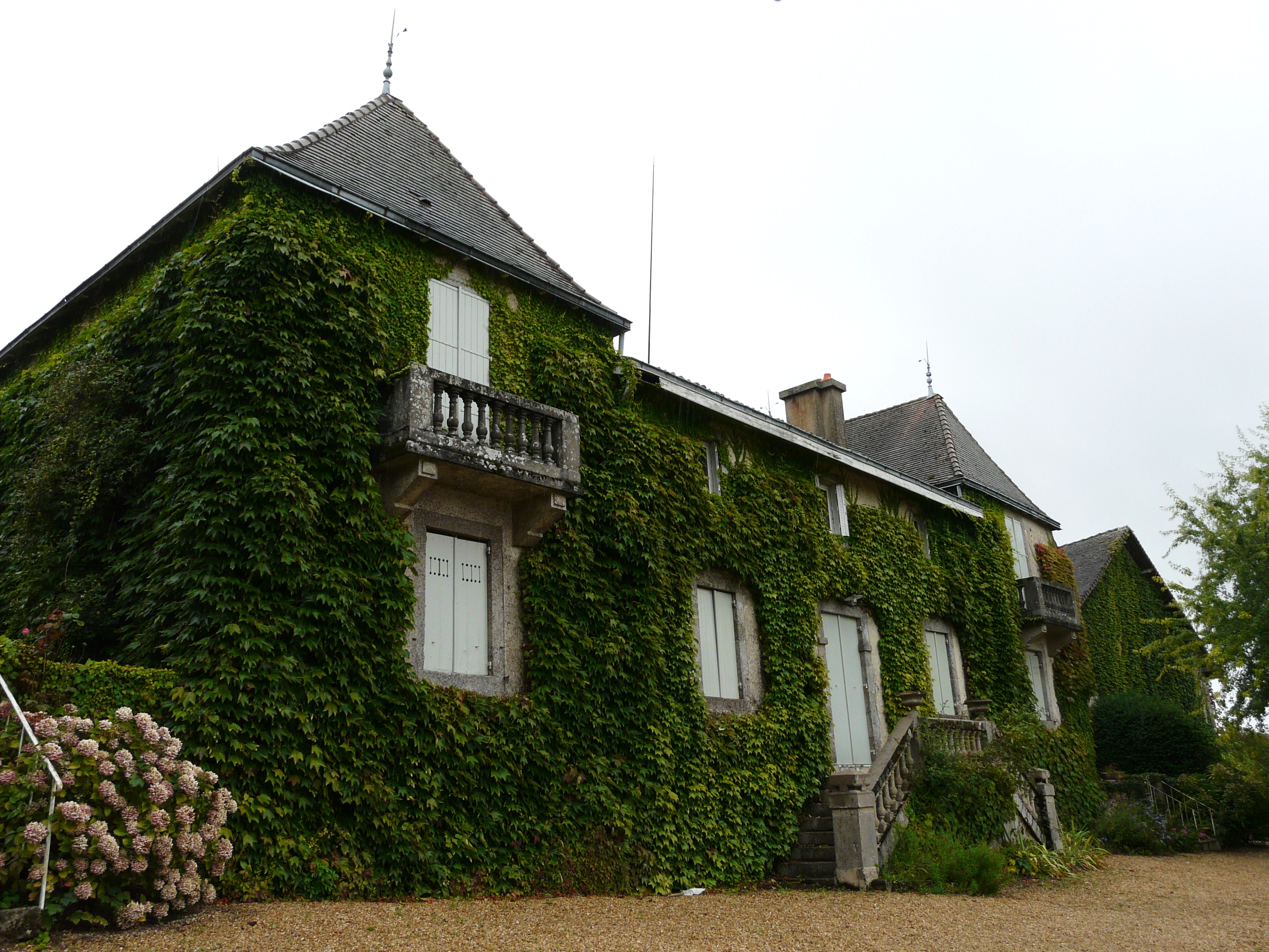 La façade nord-ouest de la chartreuse, château de Montcigoux, Saint-Pierre-de-Frugie, Dordogne, France